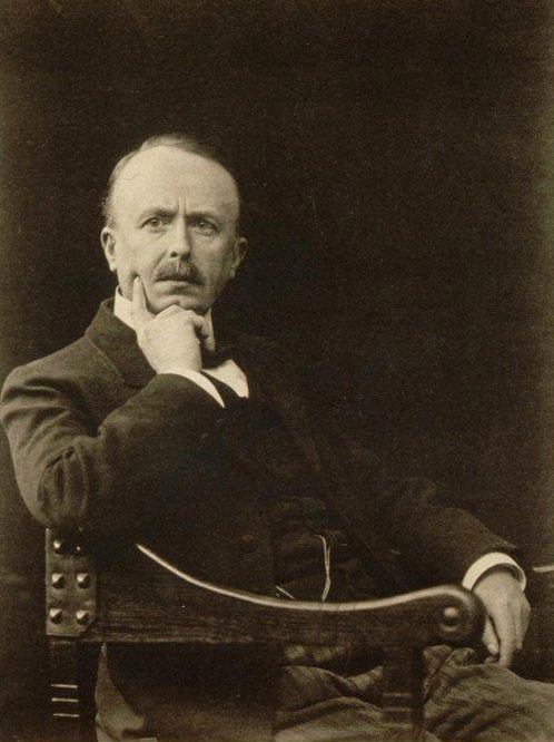 Gustave Stoskopf vers 1912, Mi-corps, 3/4 à dr. 1912. Bibliothèque nationale et universitaire de Strasbourg